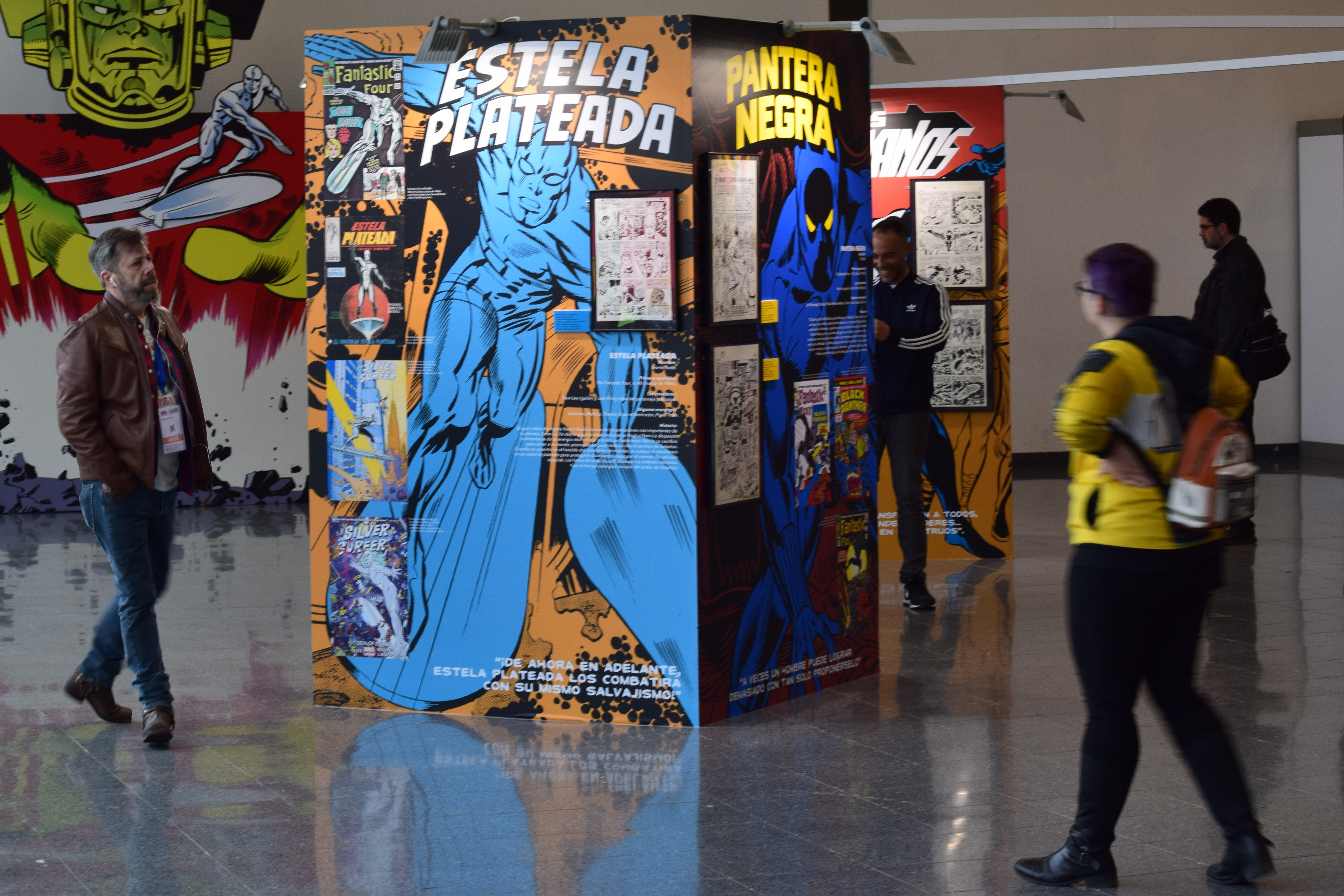 Exposició "Stan Lee & the american comic book". Comissari: Antoni Guiral. 37 Comic Barcelona, 2019.